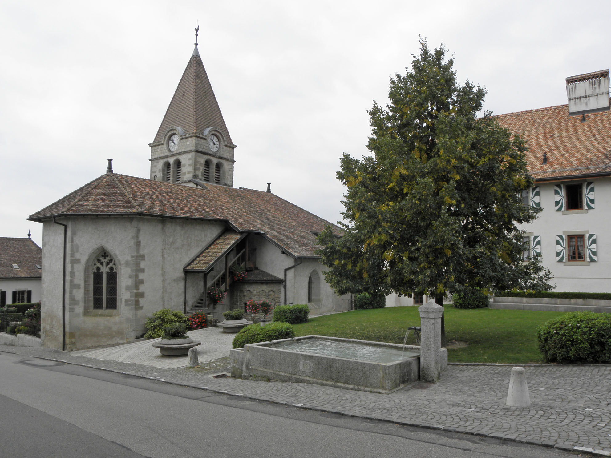 Eglise de Bursins